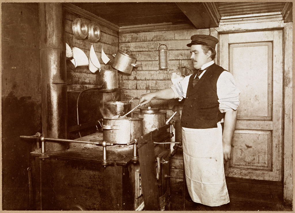 Tittel / Title: Adolf Henrik Lindstrøm Motiv / Motif: Lindstrøm (antakelig i 20-åra) står i byssa og lager mat. Bildet er sannsynligvis tatt om bord i "D/S Hålogaland". Eier / Owner Institution: Nasjonalbiblioteket / National Library of Norway Bildesignatur / Image Number: blds_03647